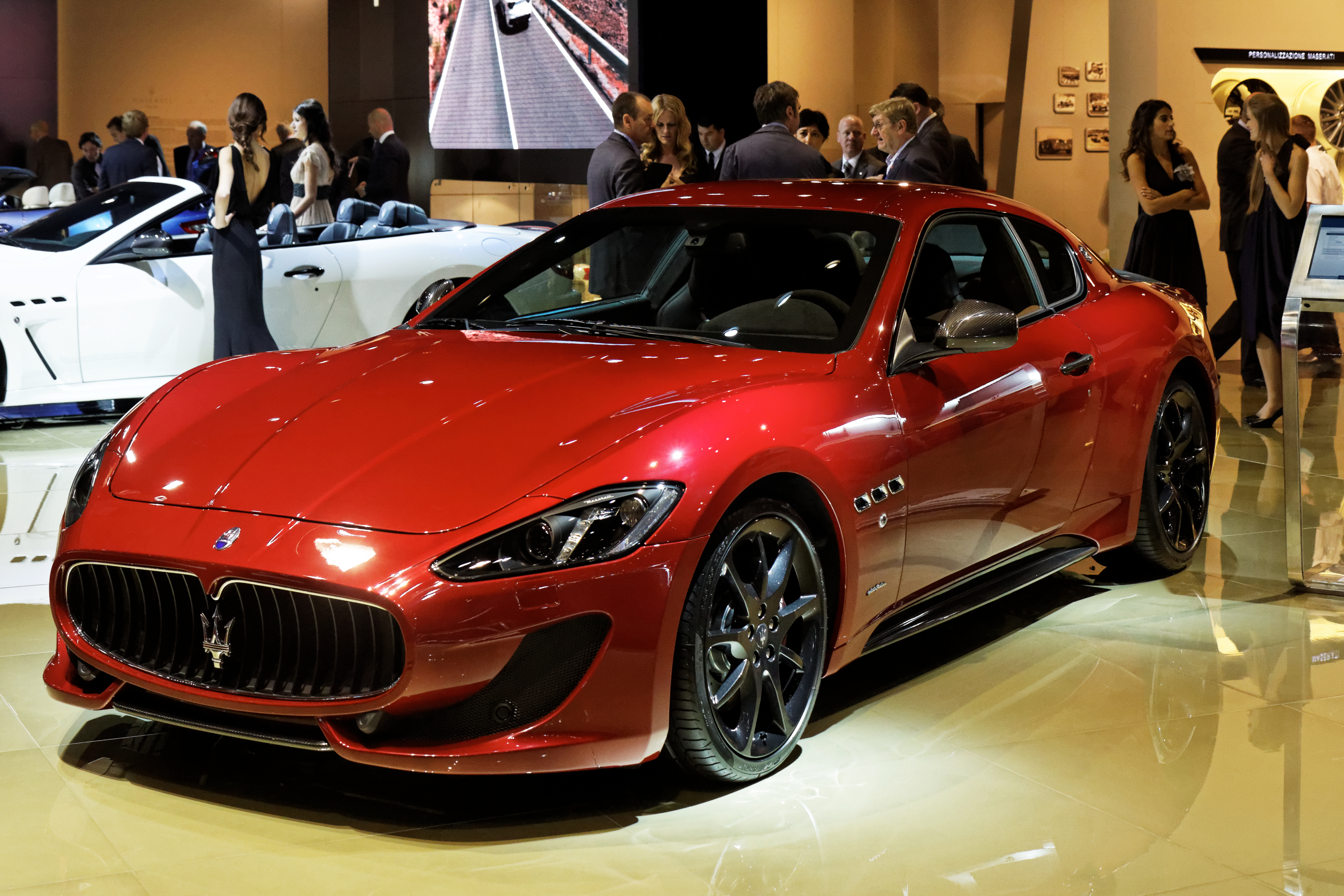 Une Maserati Granturismo MC Stradale présentée lors du Mondial de l'Automobile de Paris 2012.